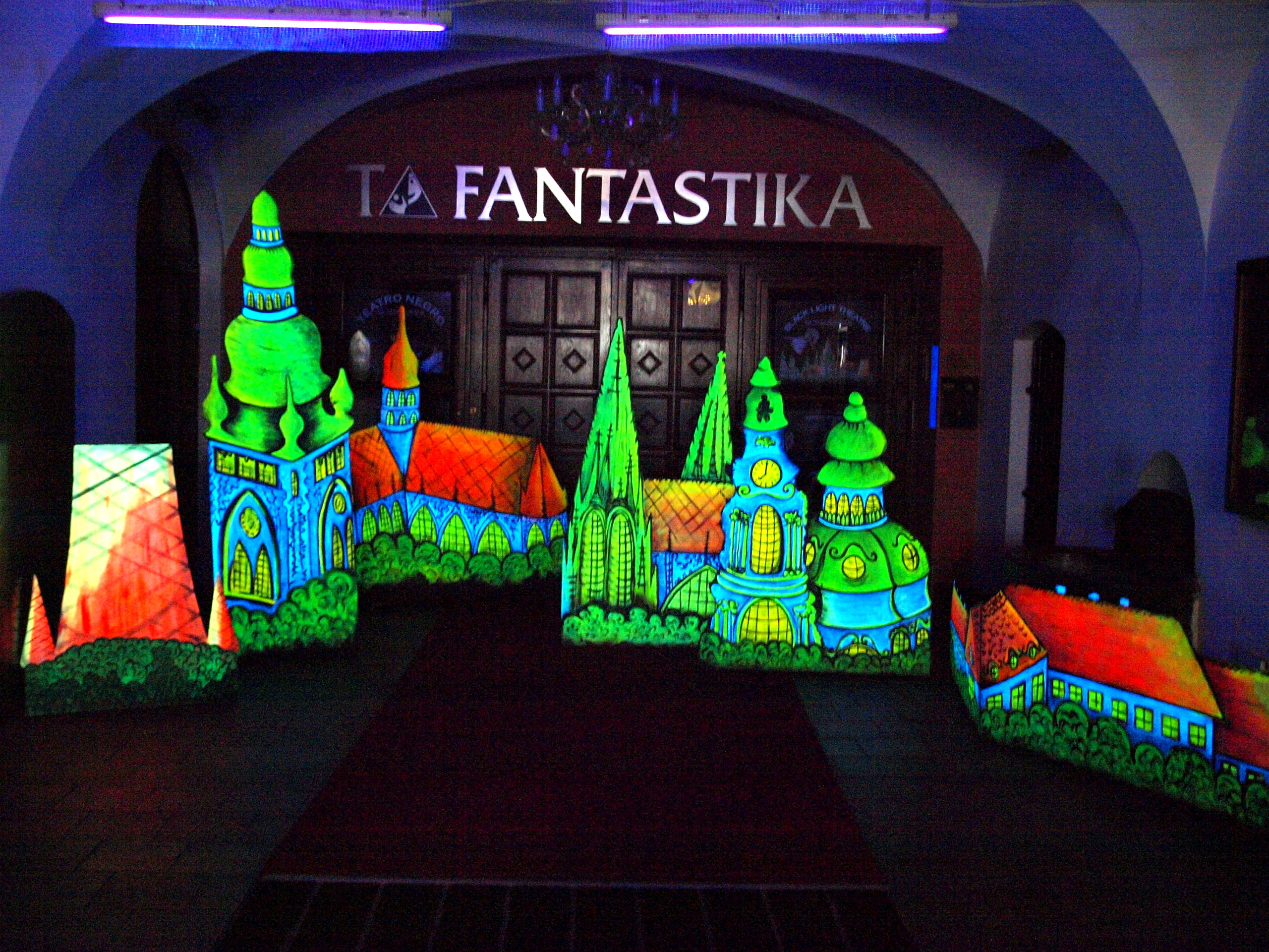 Pöttingovský palác